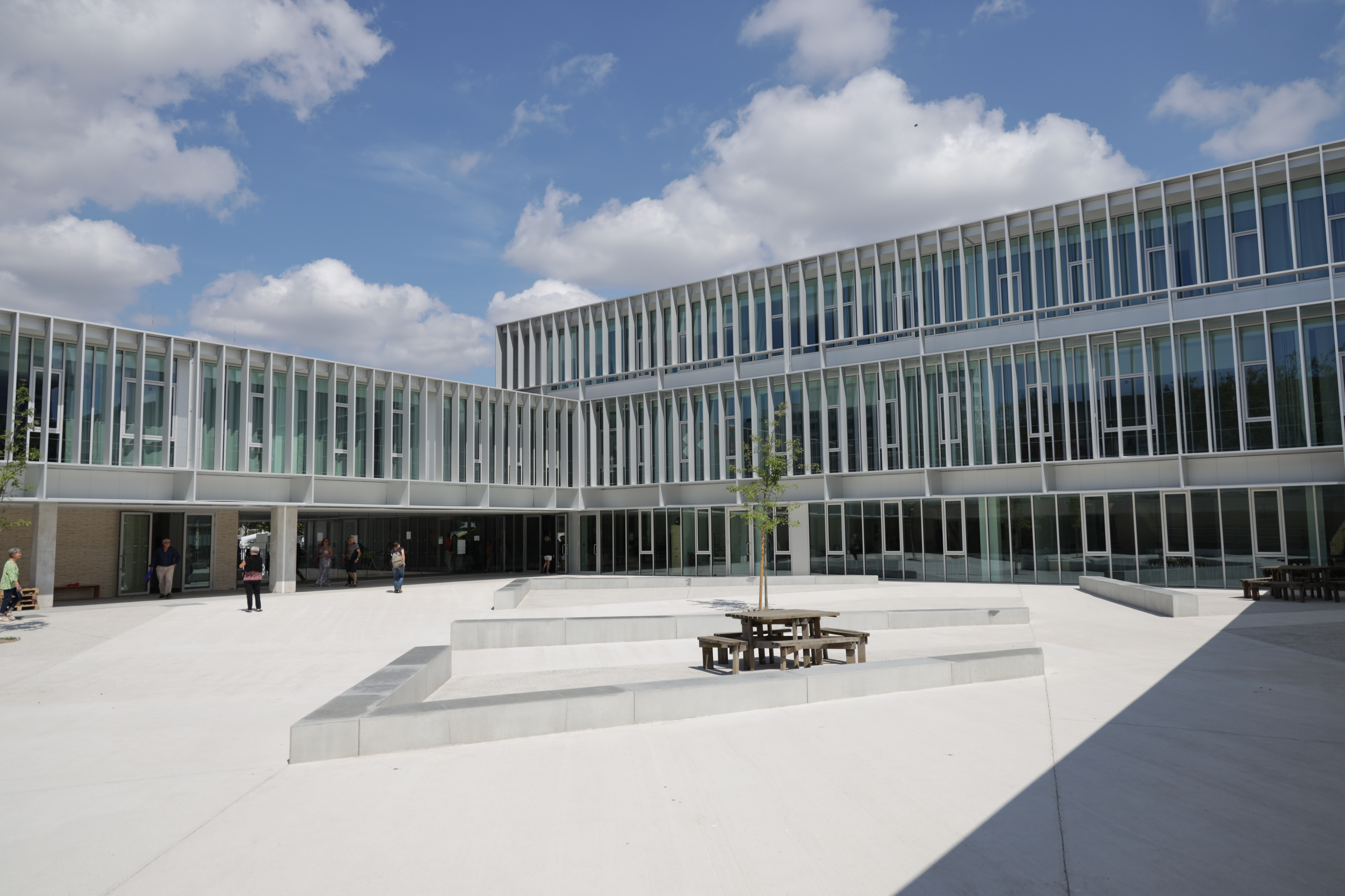 cours intérieure du collège Brizeux de Lrient